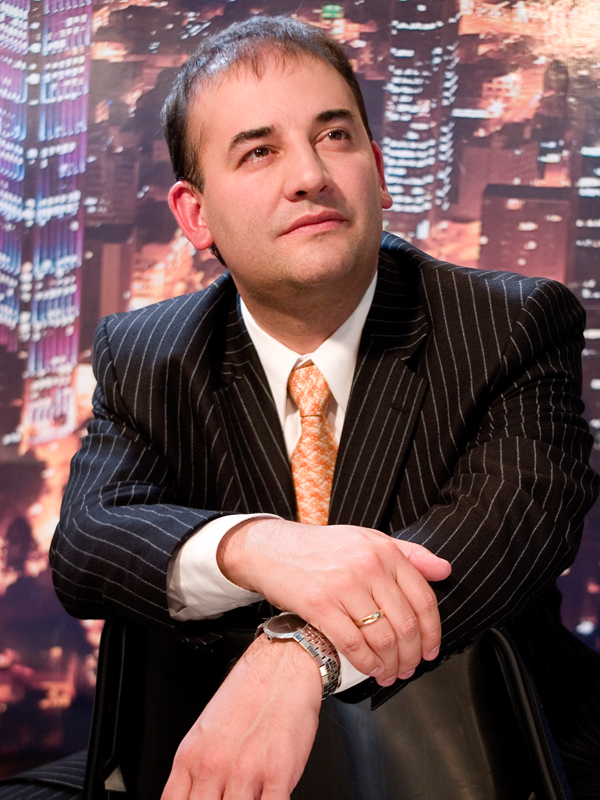 Concejal de Bogotá Carlos Alberto Baena Lopez del Movimiento Independiente de Renovación Absoluta MIRA